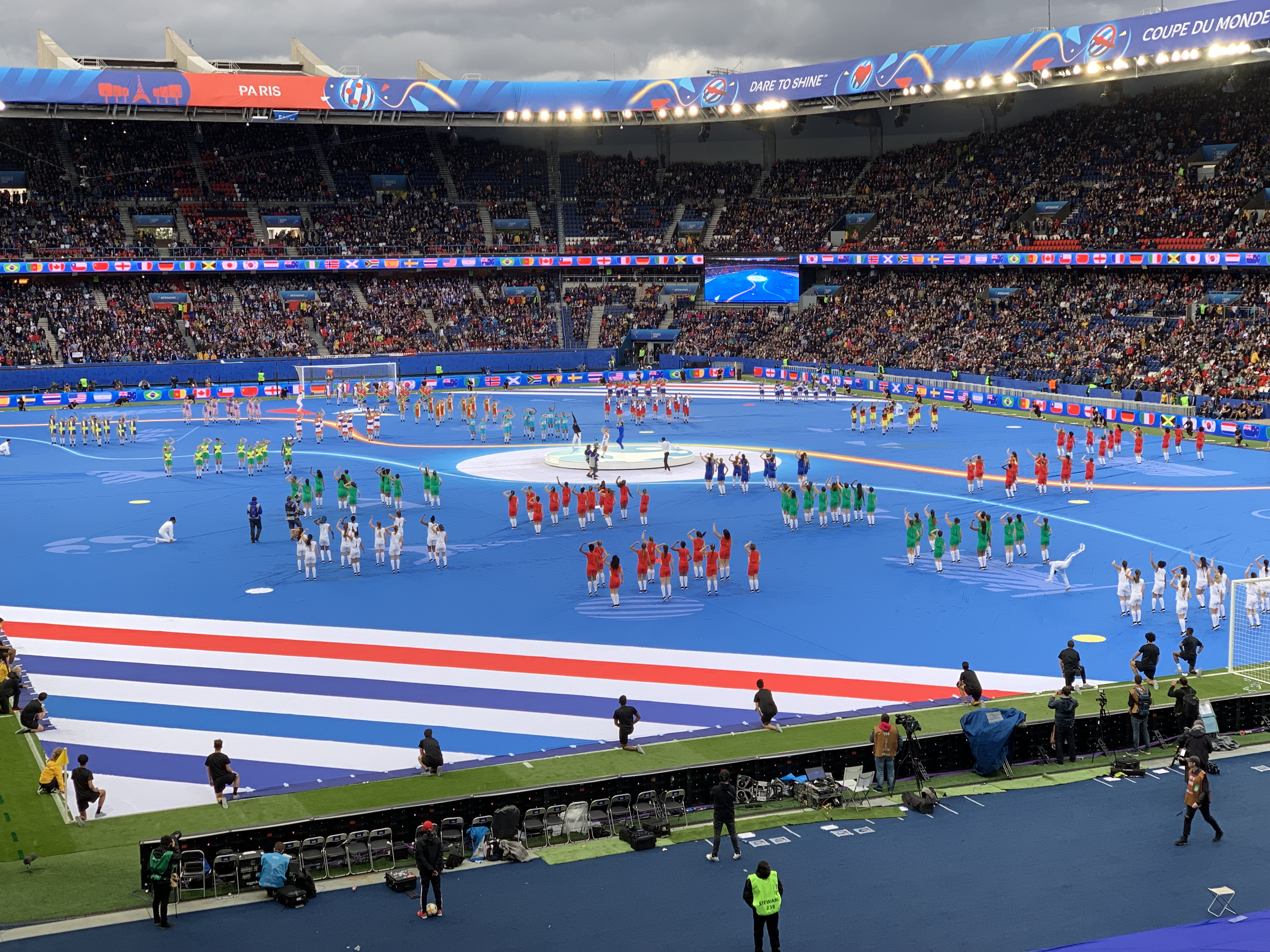 Match d'ouverture de la coupe du monde féminine de football : France vs Corée du Sud le 7 juin 2019 au Parc des Princes à Paris.